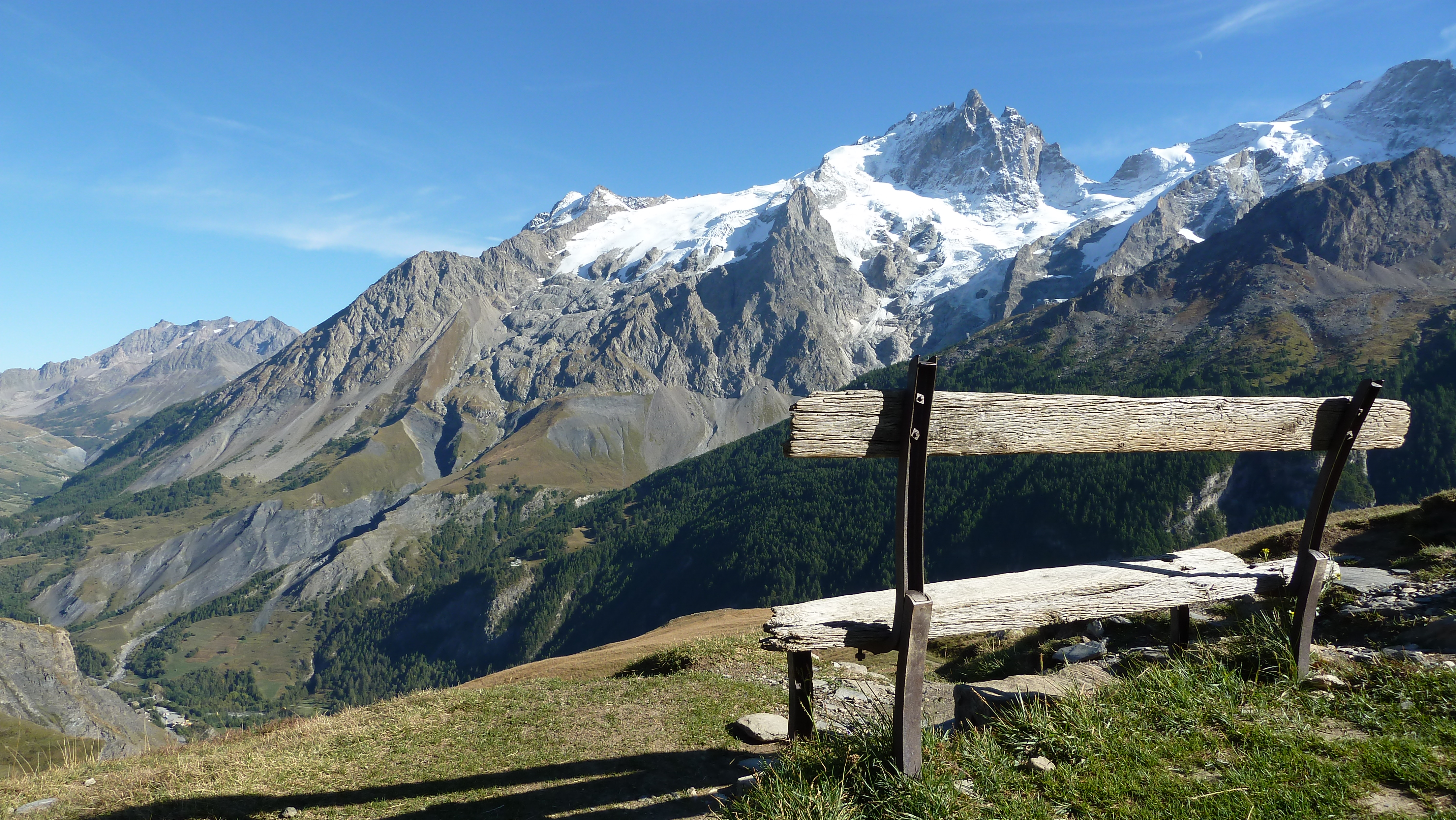 Massif des écrins vu du plateau d'emparis (Hautes Alpes)